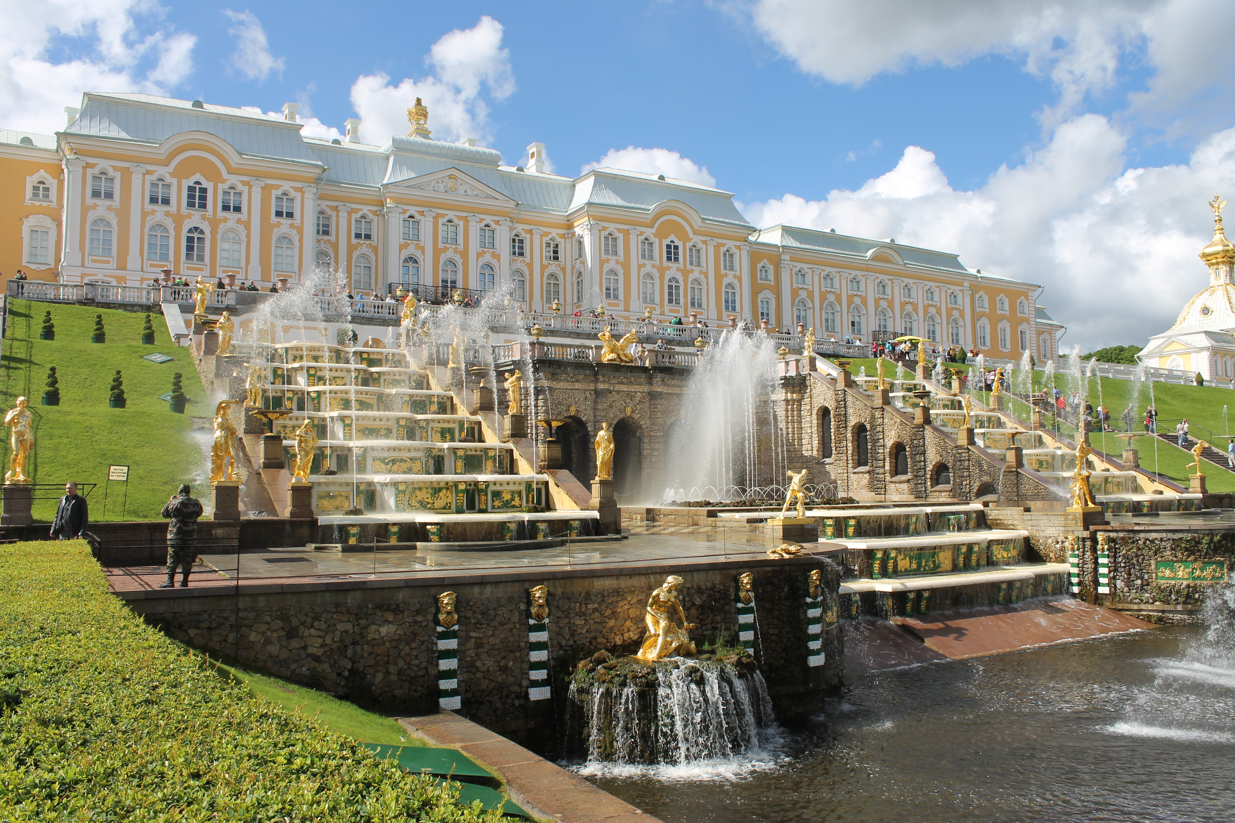 Большой каскад (Санкт-Петербург, Петергоф, Нижний парк, между Большим дворцом и Большим (Самсоновским) каналом)